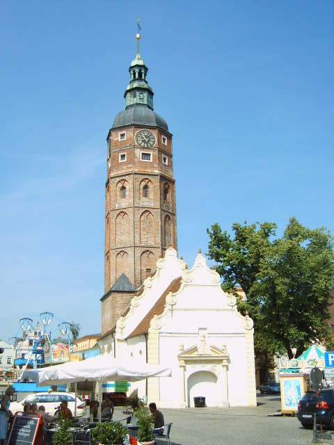 Georgenkapelle mit Hausmannsturm in Luckau, Land Brandenburg, Deutschland Bild aufgenommen am 25.6.2006 von Olaf Meister